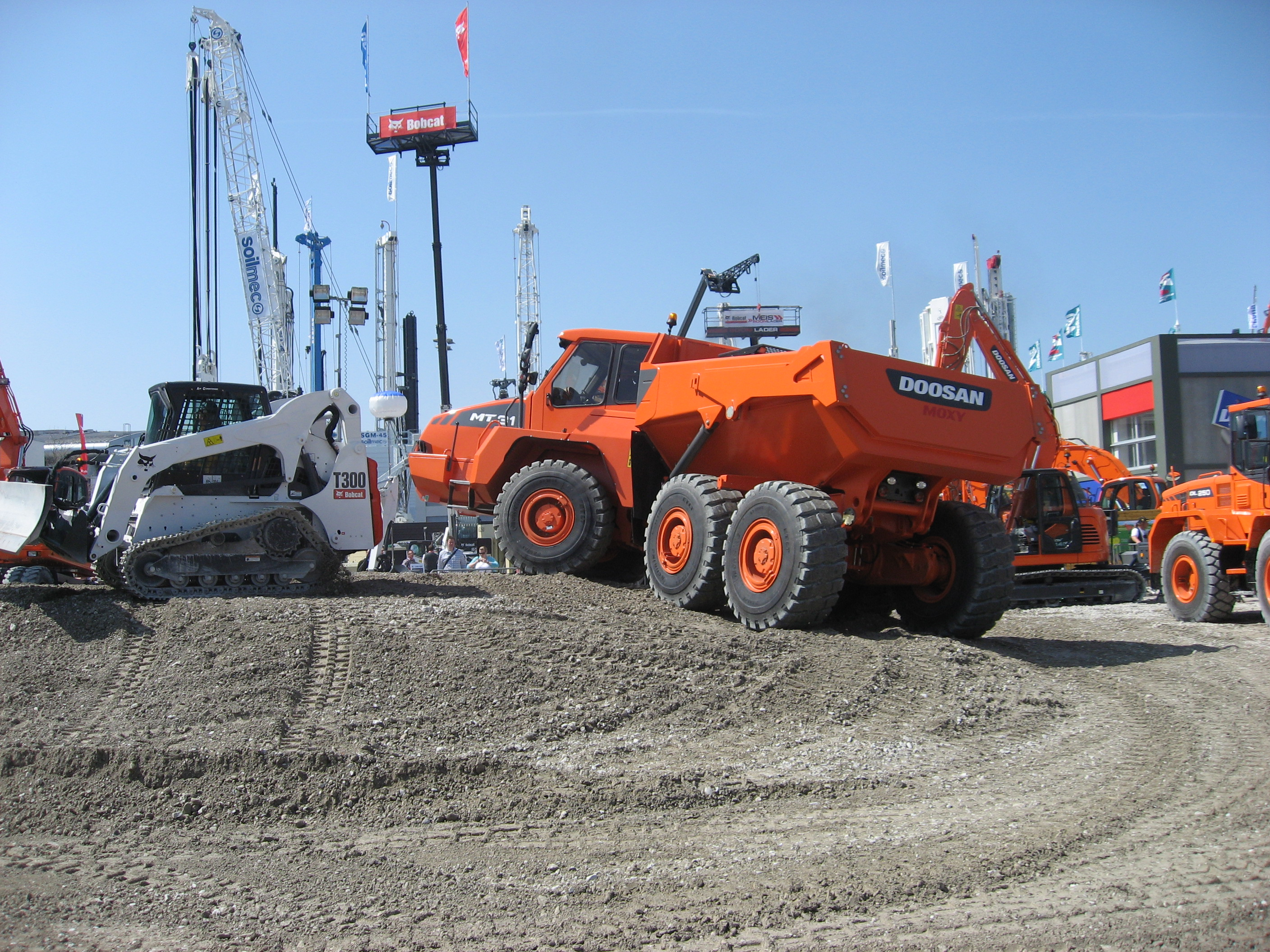 Doosan Moxy Muldenkipper MT31 und Bobcat Raupe auf der Bauma 2010 in München